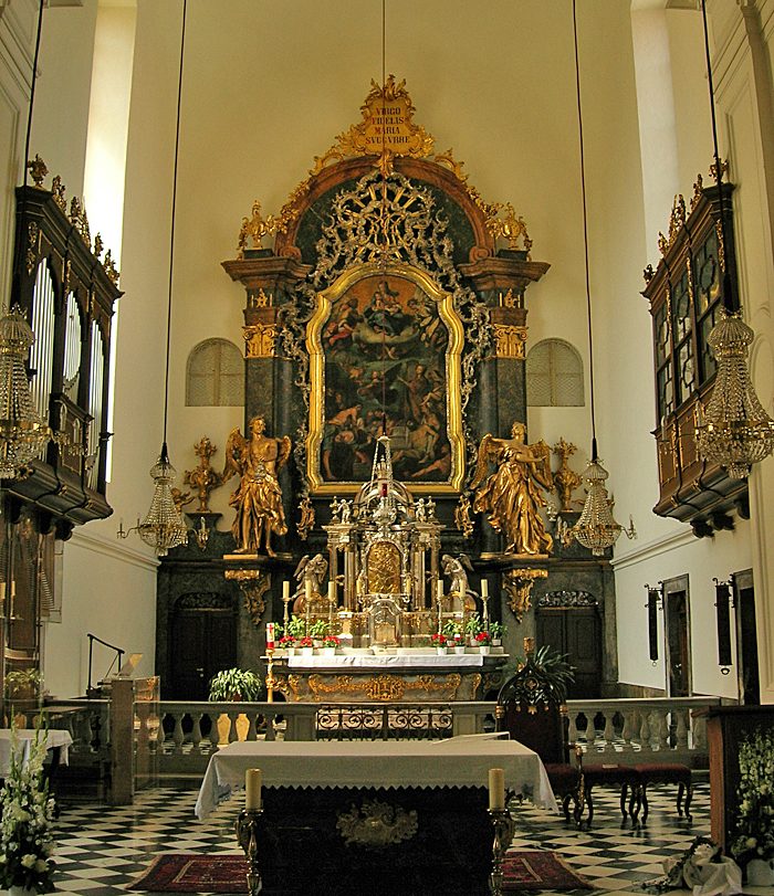 Inneres der Mariahilferkirche in Graz